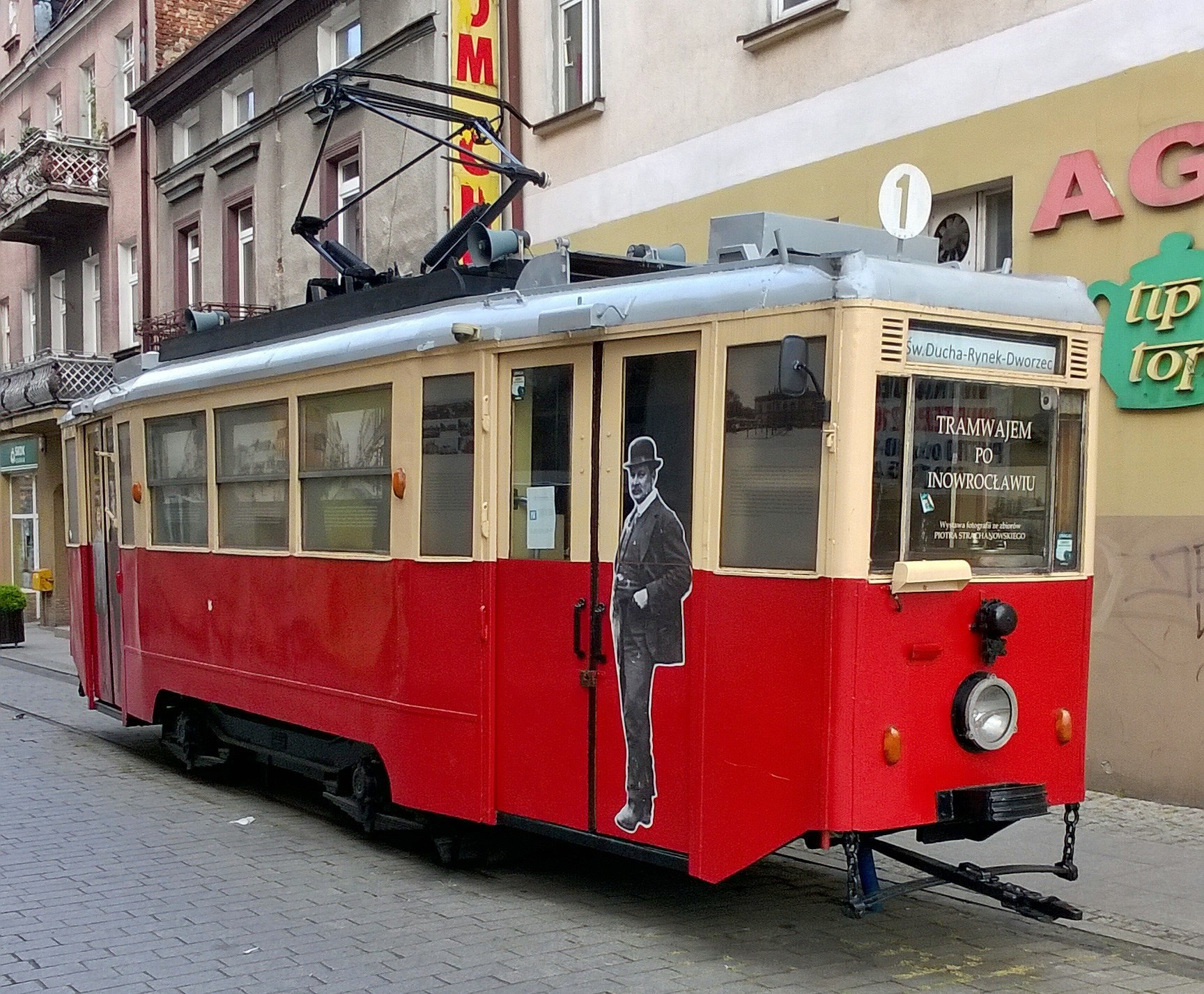 Zabytkowy tramwaj w Inowrocławiu